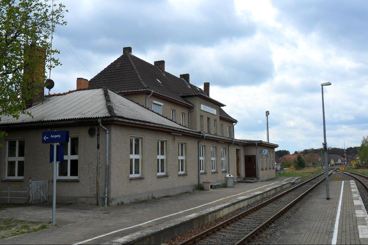 Bahnhof Wesenberg